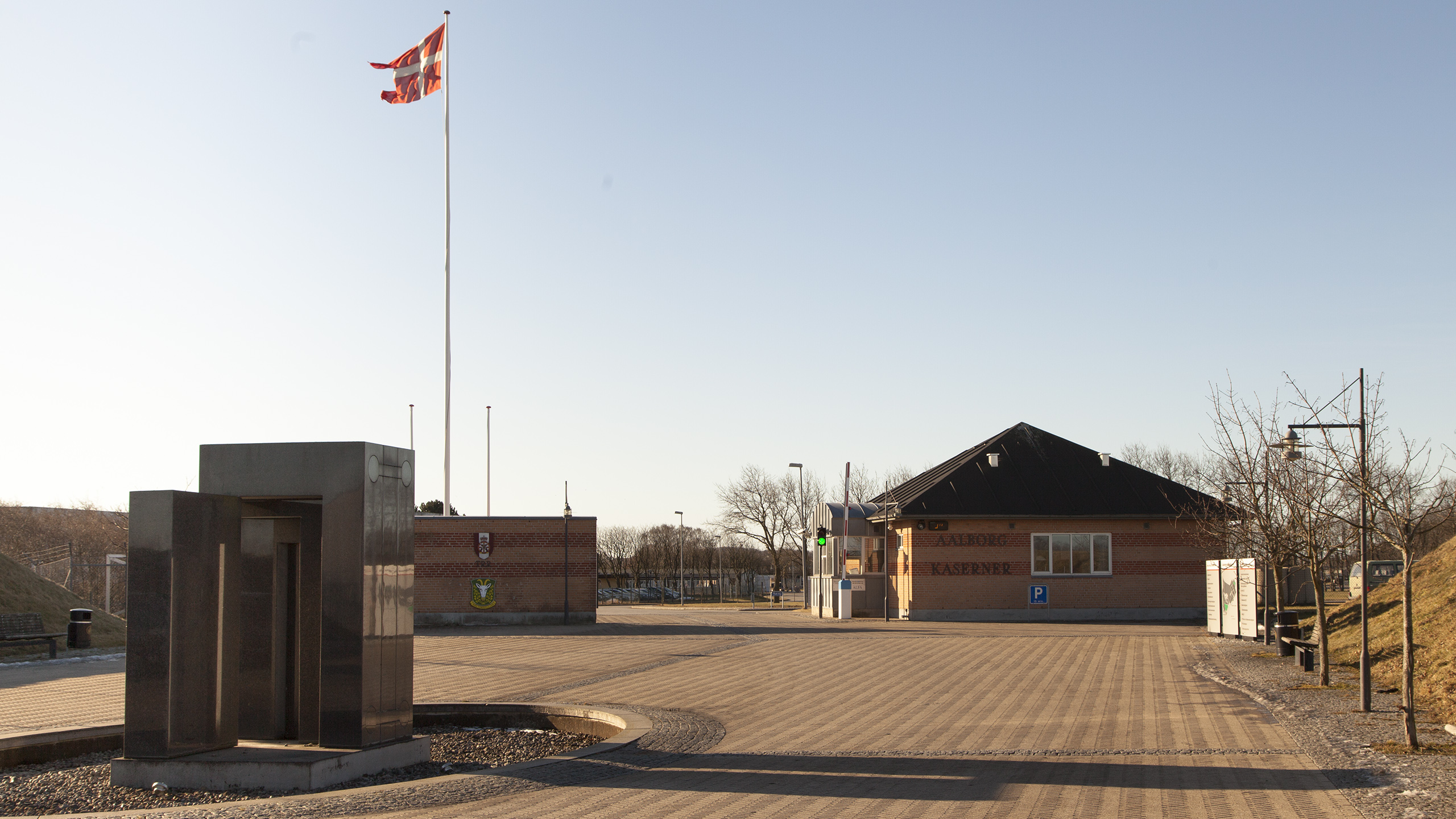 Aalborg Kaserner